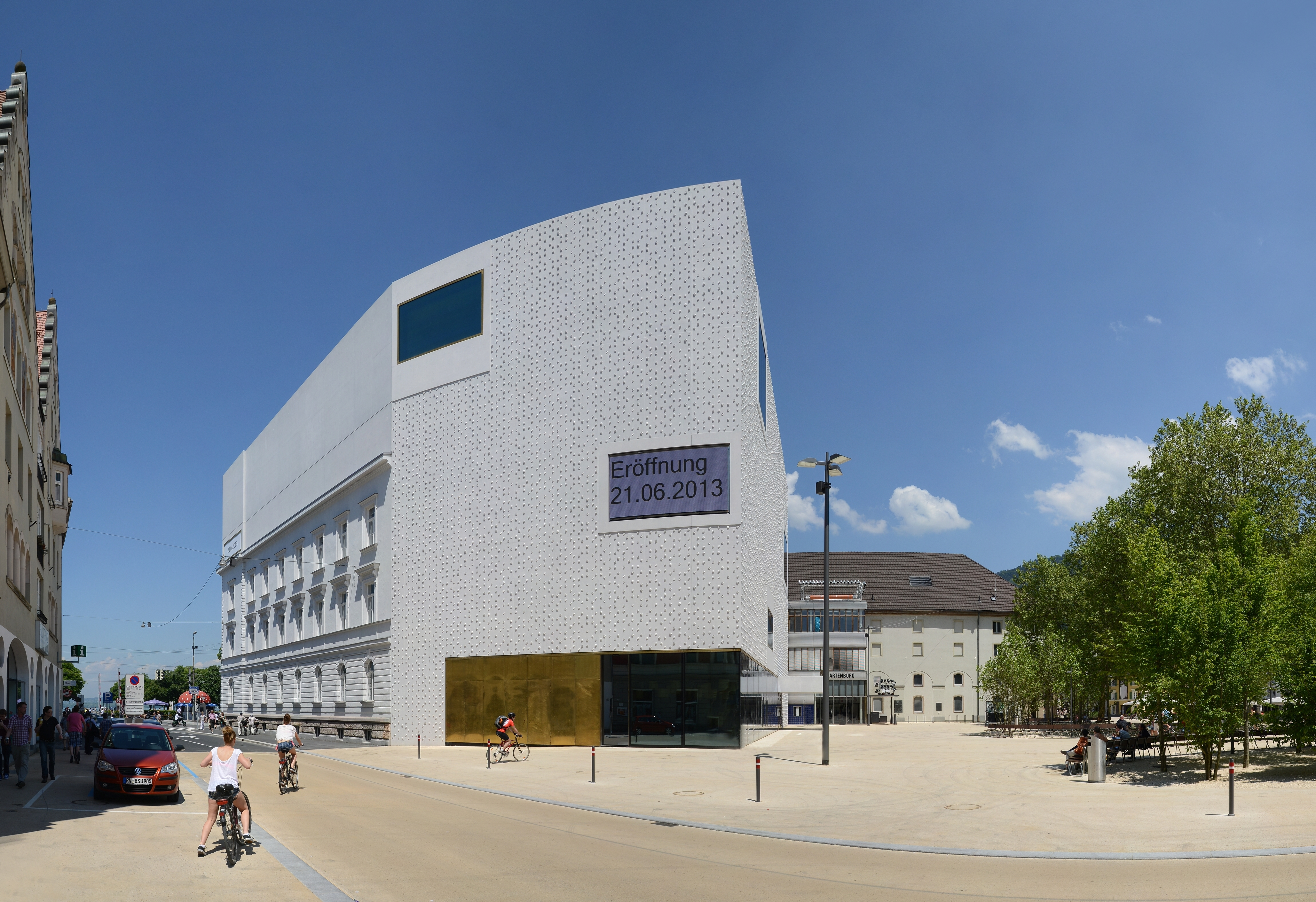 Vorarlberger Landesmuseum, in Bregenz Fassade zur Rathausstraße (links) und zum Kornmarkt.